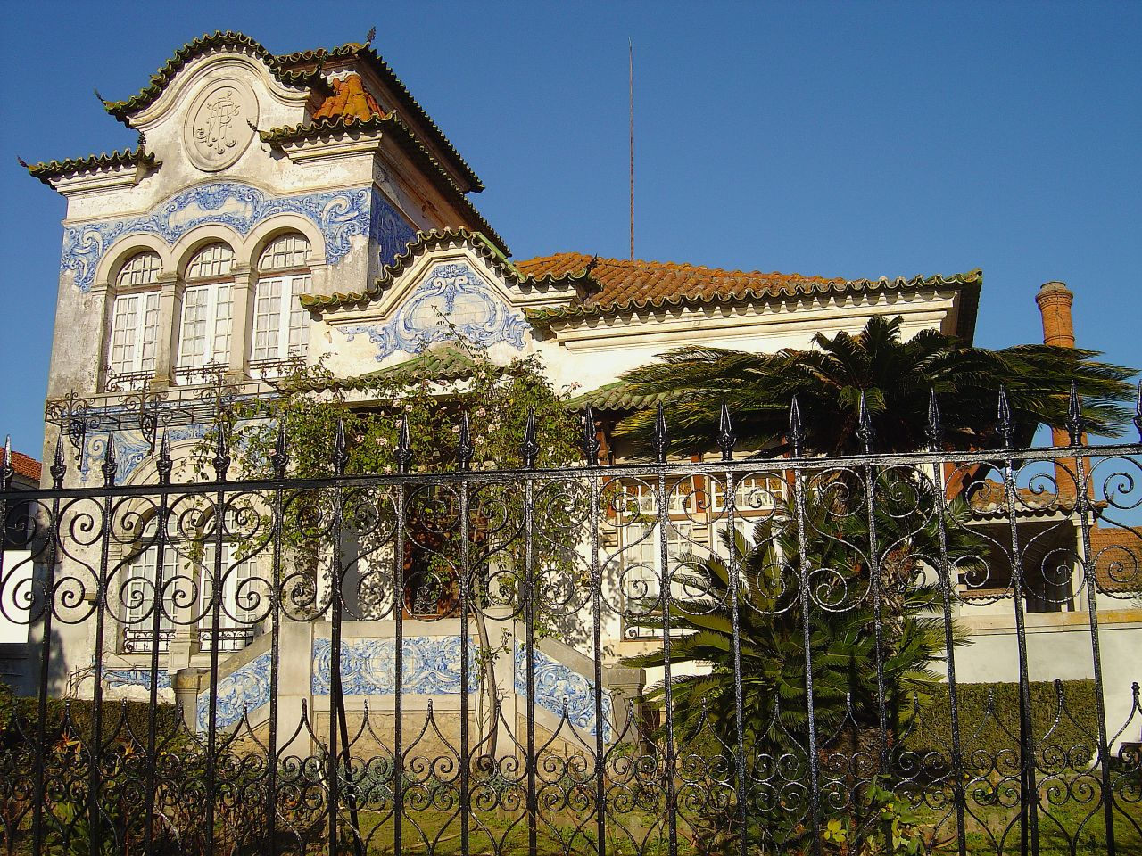 Bombarral (Portugal)